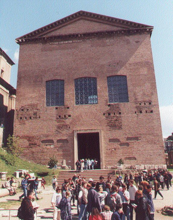 Facciata della Curia Iulia, l'edificio in cui si riuniva il Senato, nei Fori imperiali di Roma, Italia.